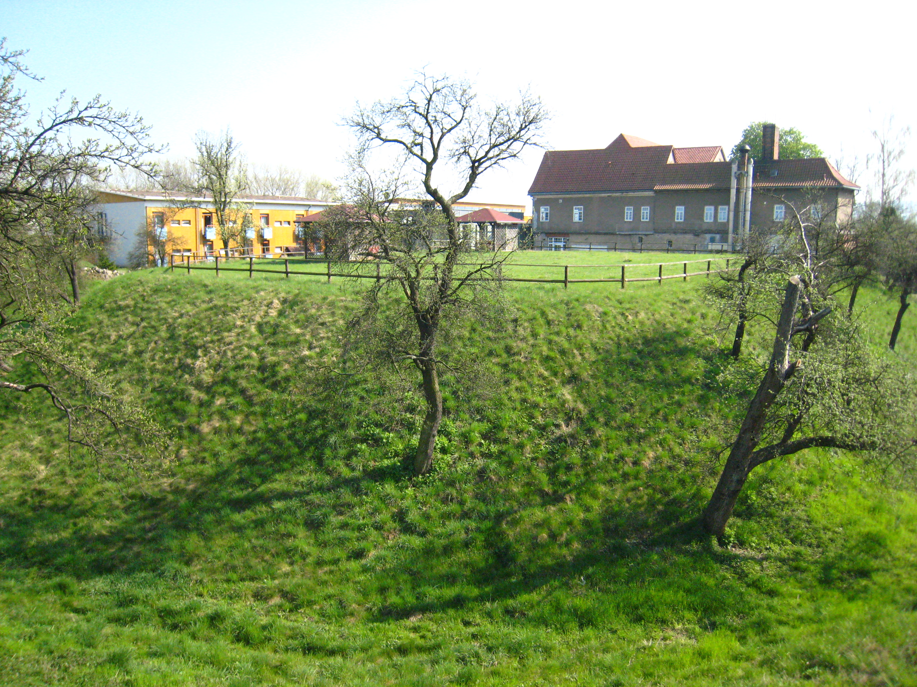 Anlage mit Graben und Vorburg der Herren von Salza, 1248 als Steinbau errichtet, Vorgängerbau aus Holz als Burg Tullistede bezeichnet, 12. und 13. Jahrhundert eigener Ritteradel, im 15. Jahrhundert Lehen der Grafen von Gleichen, 1540 erfolglose Belagerung - Einäscherung des Ortes, 1806 Plünderung, seitdem Grünland. Quelle: Thüringisches Landesamt für archäologische Denkmalpflege, Weimar